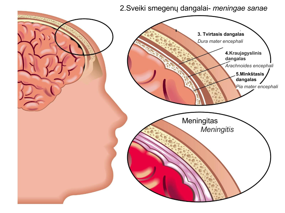 meningitas